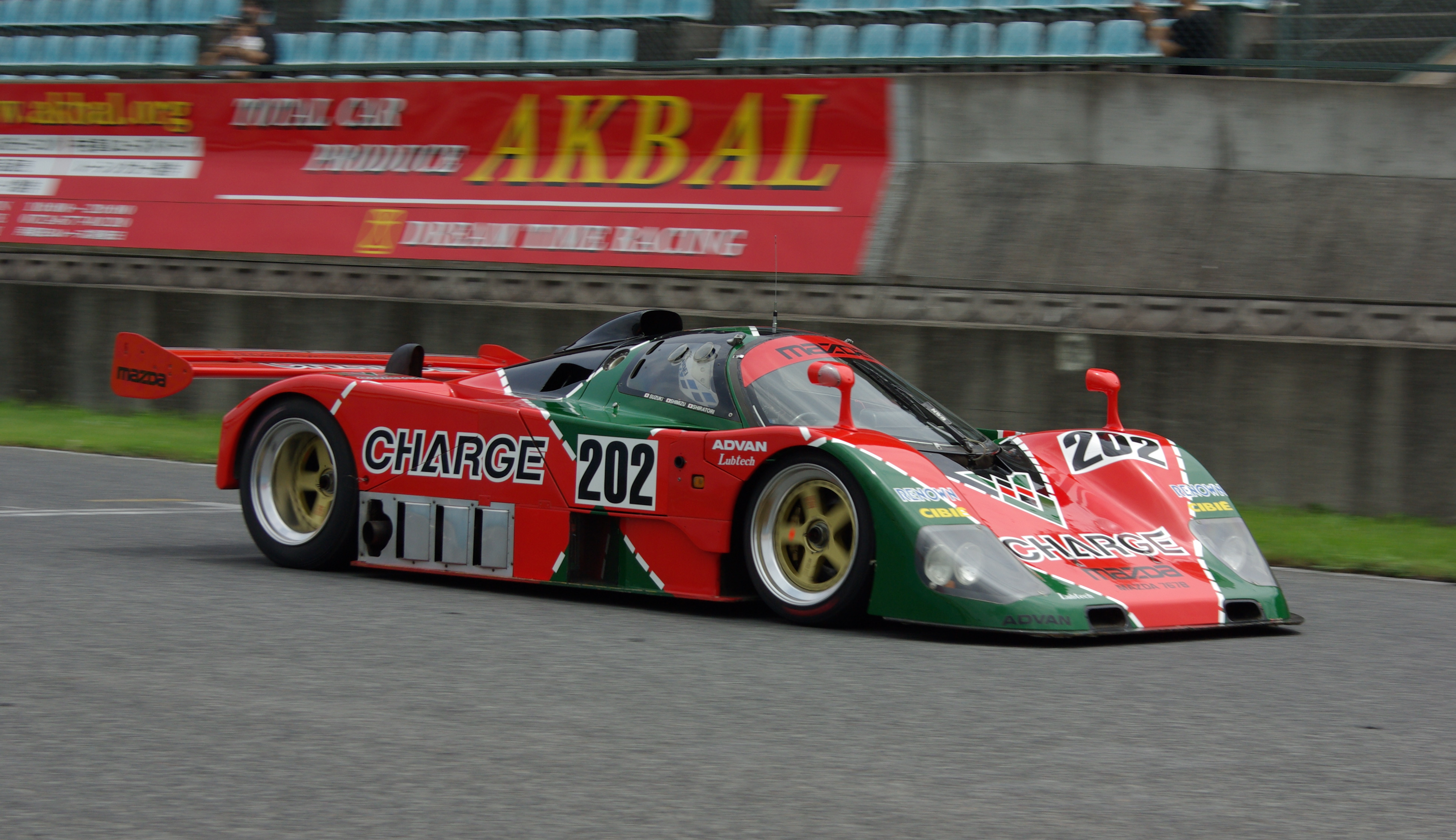 mazda 767B 兵庫県セントラルサーキット